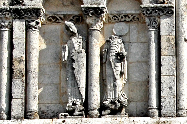 Pfarrkirche Saint-Pierre-de-Pérignac, Tugenden und Laster